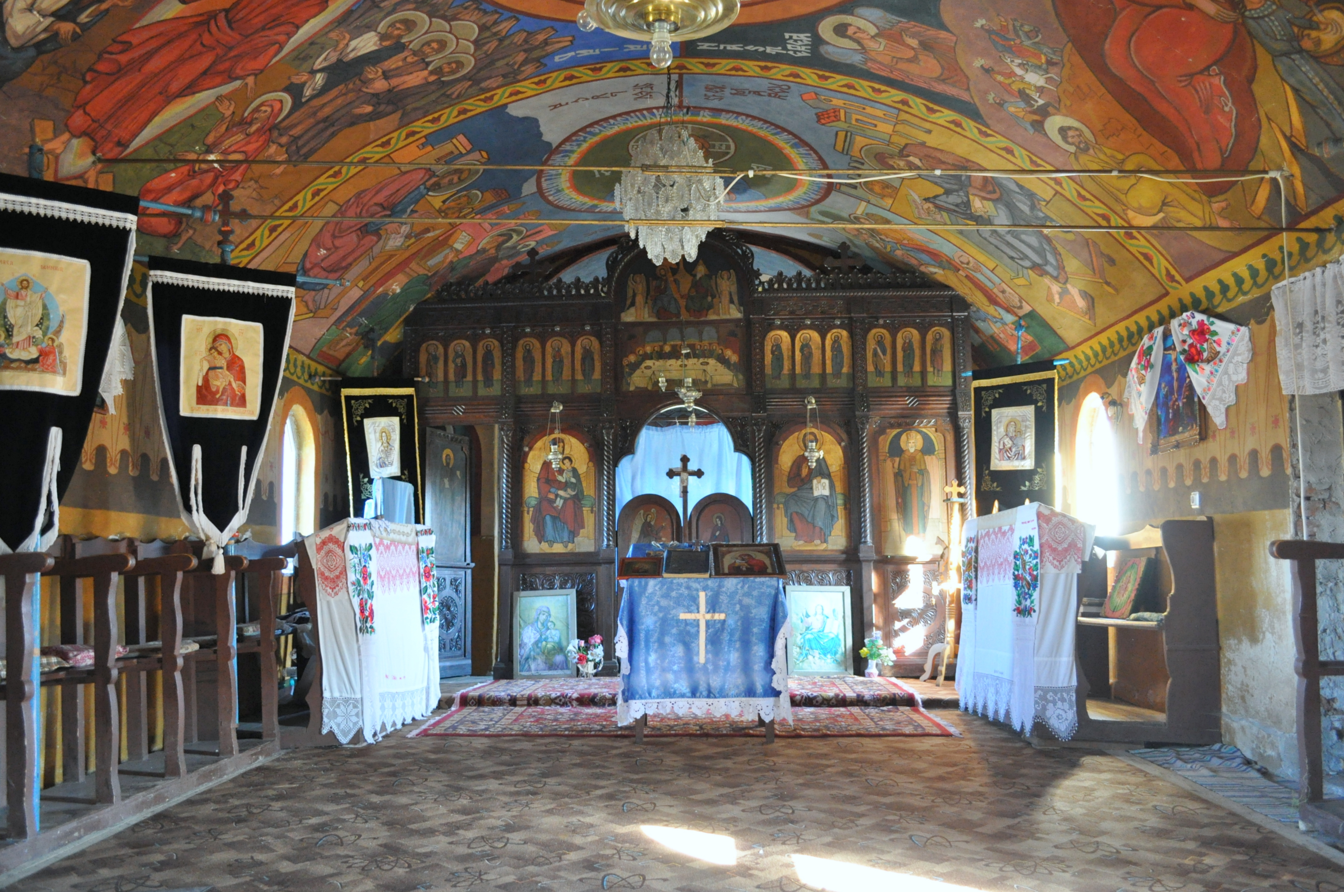 Biserica de lemn „Sființii Arhangheli Mihail şi Gavriil" din Colești, județul Bihor